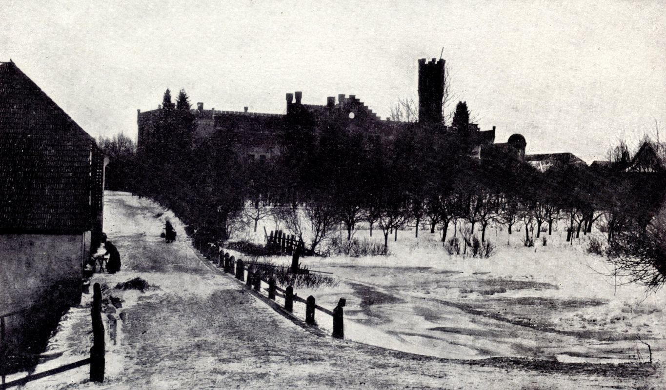 Odziena mõis pärast 1905. a põlengut